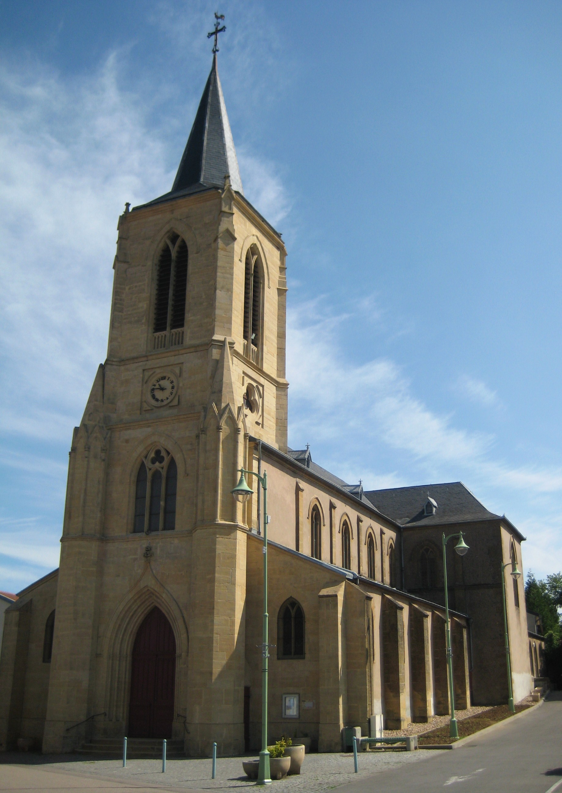 Description Église Saint-Denis de Neufchef Date22 May 2009Sourcemon appareil photoAuthorAimelaime Église Saint-Denis de Neufchef